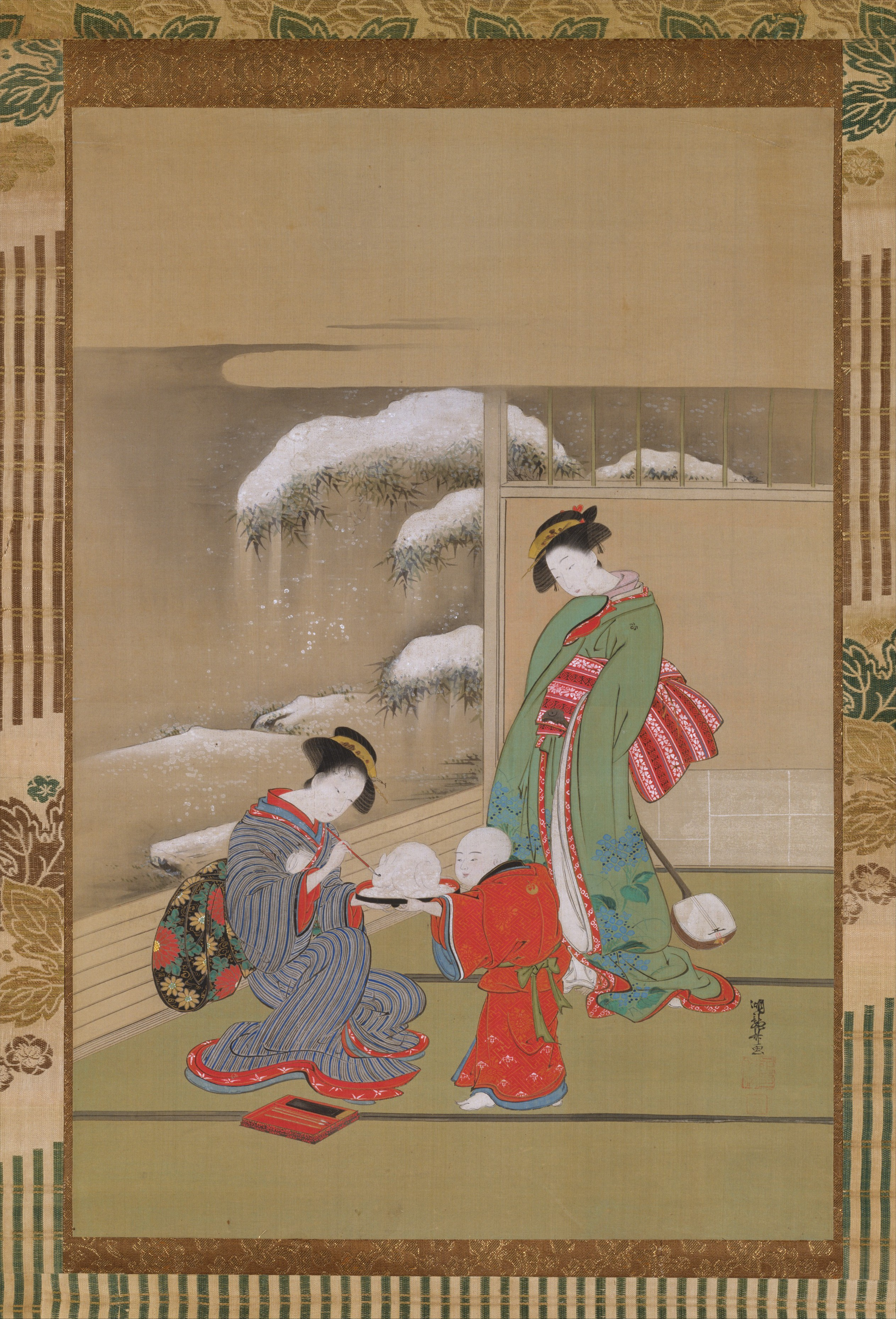 Japan; Hanging scroll; Paintings